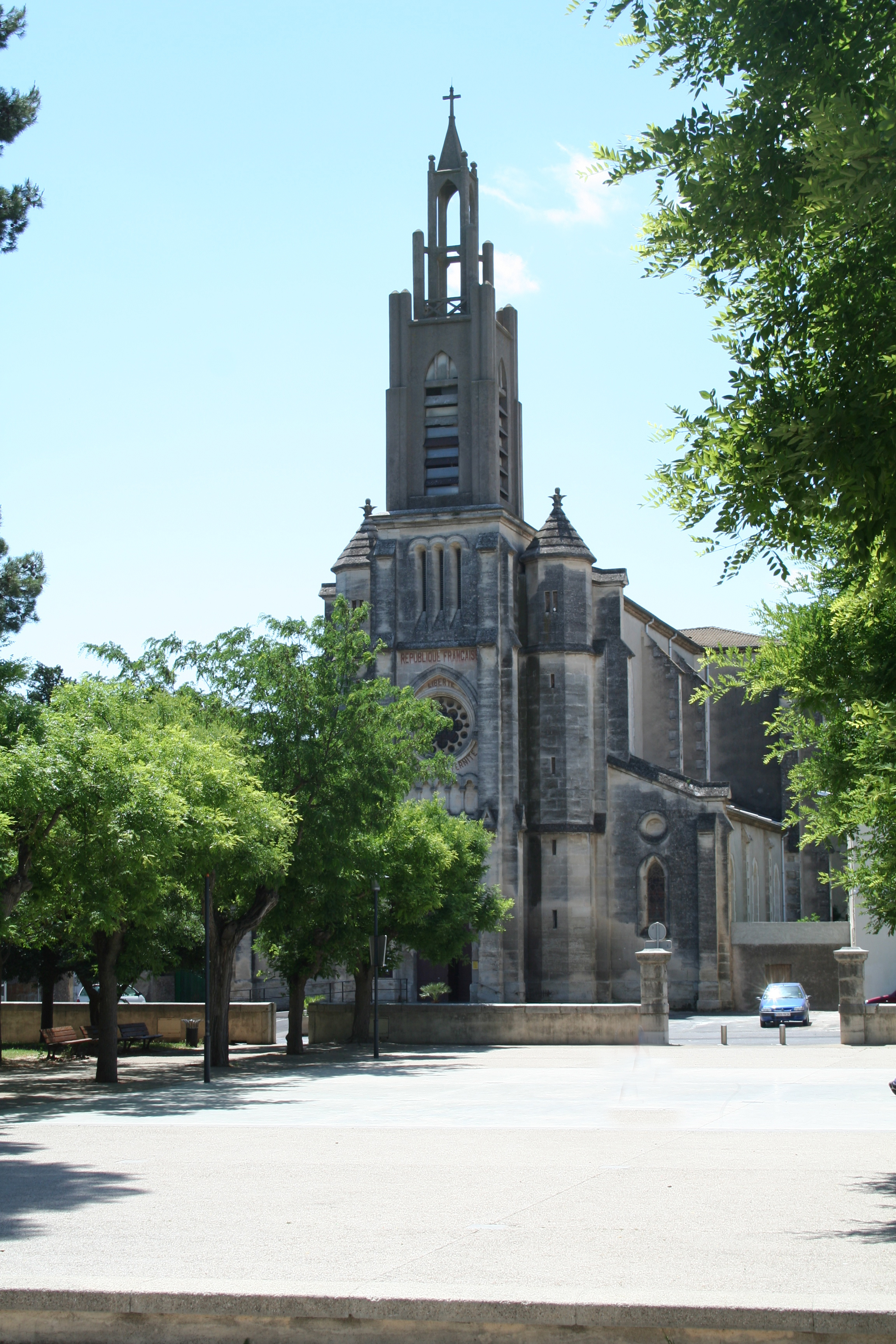 Gigean (France) - église Saint-Geniès.